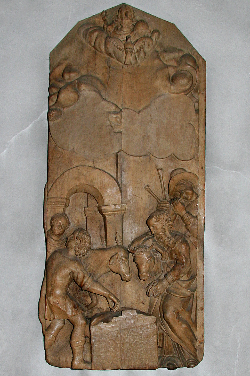 Anbetung der Hirten in der Propsteikirche Brilon. Ausschnitt aus